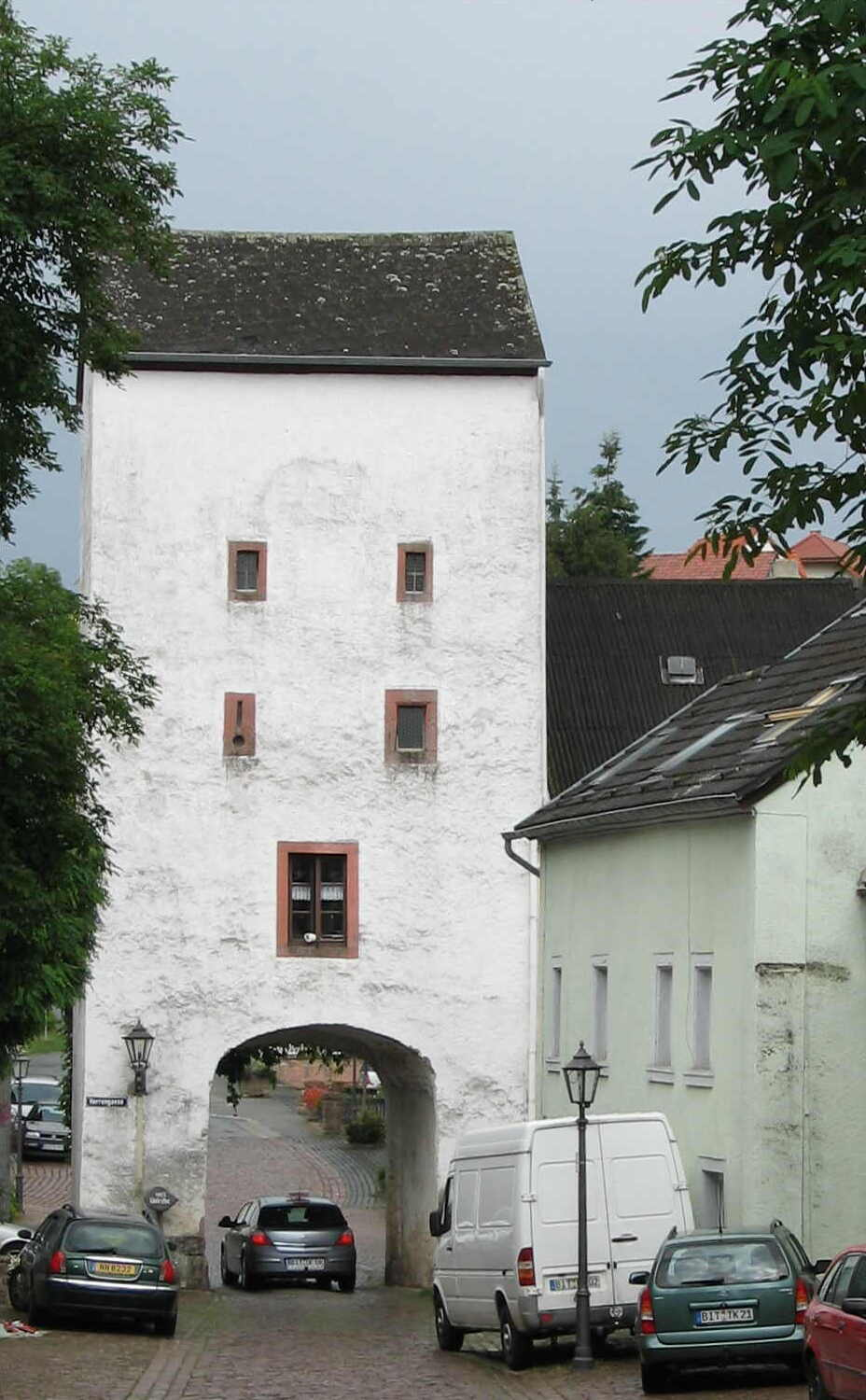 Dudeldorf